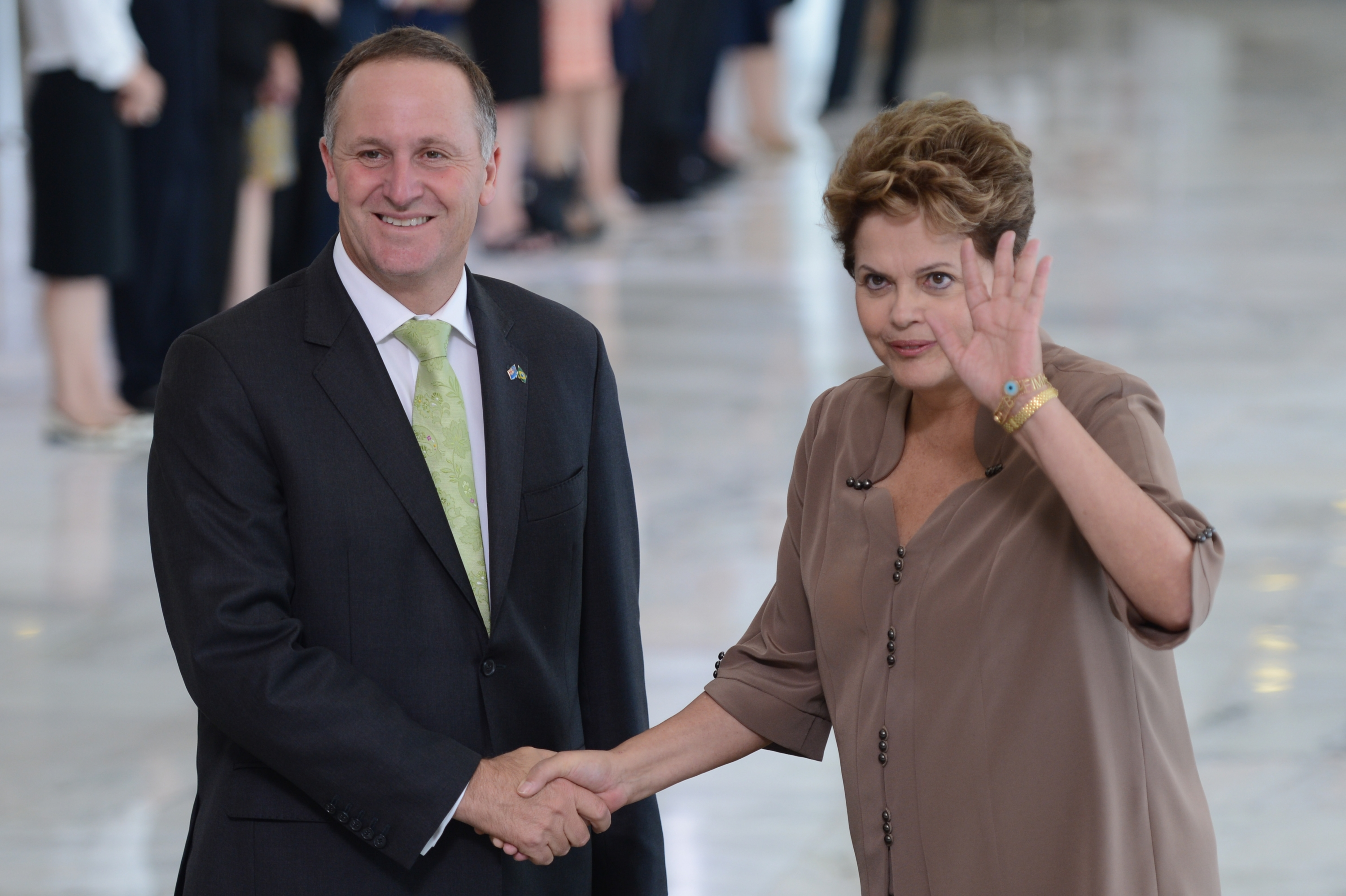 A presidenta Dilma Rousseff, participa da cerimônia de chegada do Primeiro-Ministro da Nova Zelândia, John Key